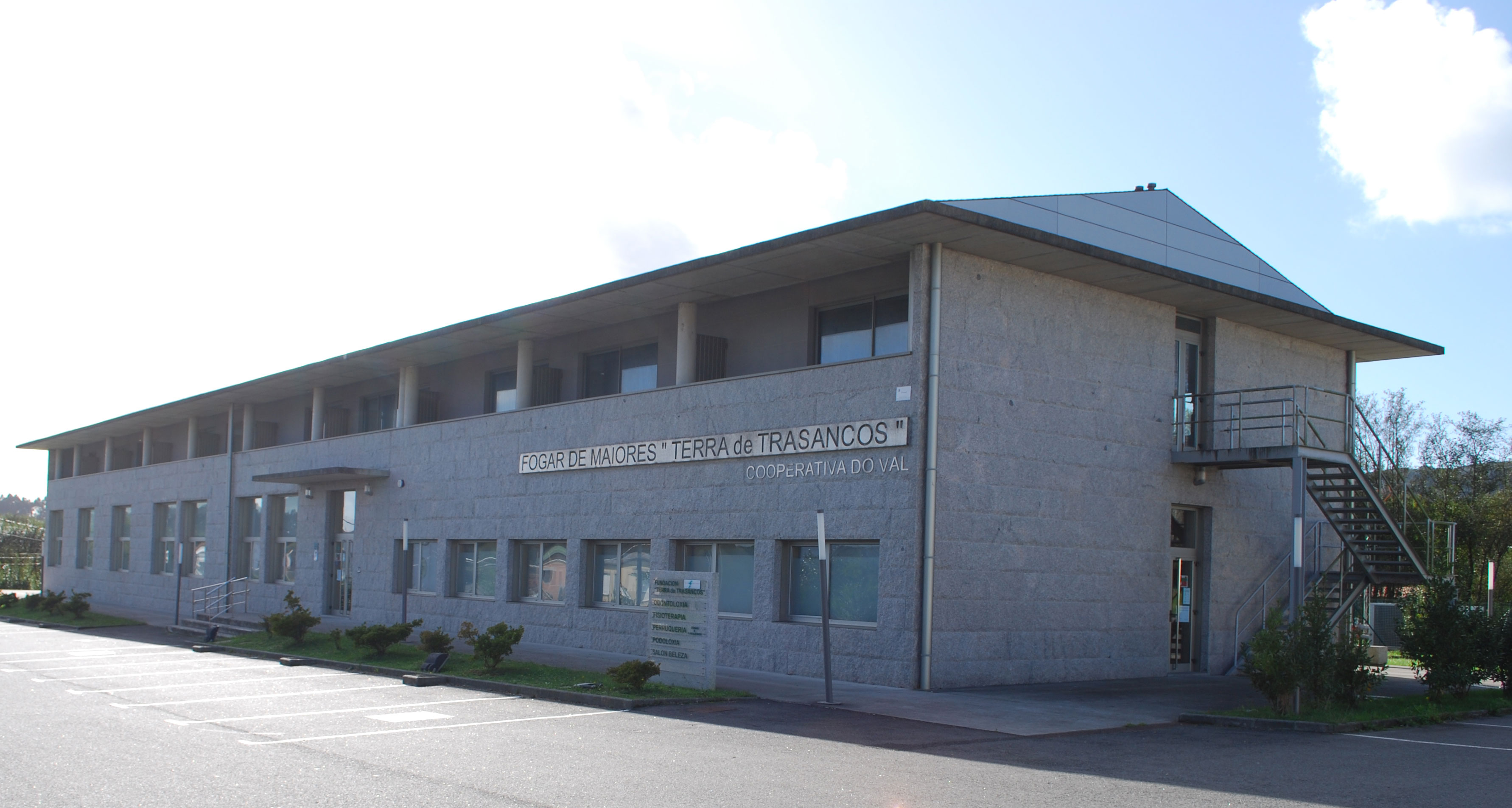 Fogar de Maiores de Trasancos Cooperativa do Val Narón, A Coruña Galiza Spain